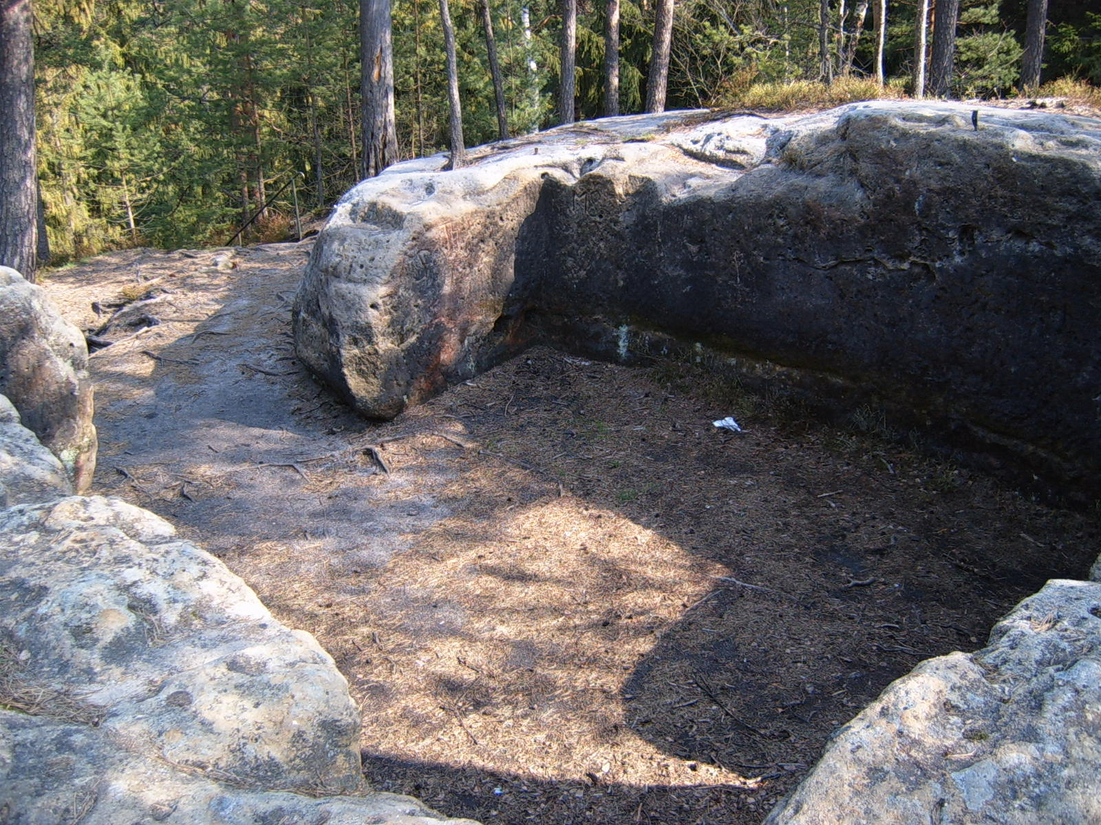 Hrad u Brtníků - podvalí věže